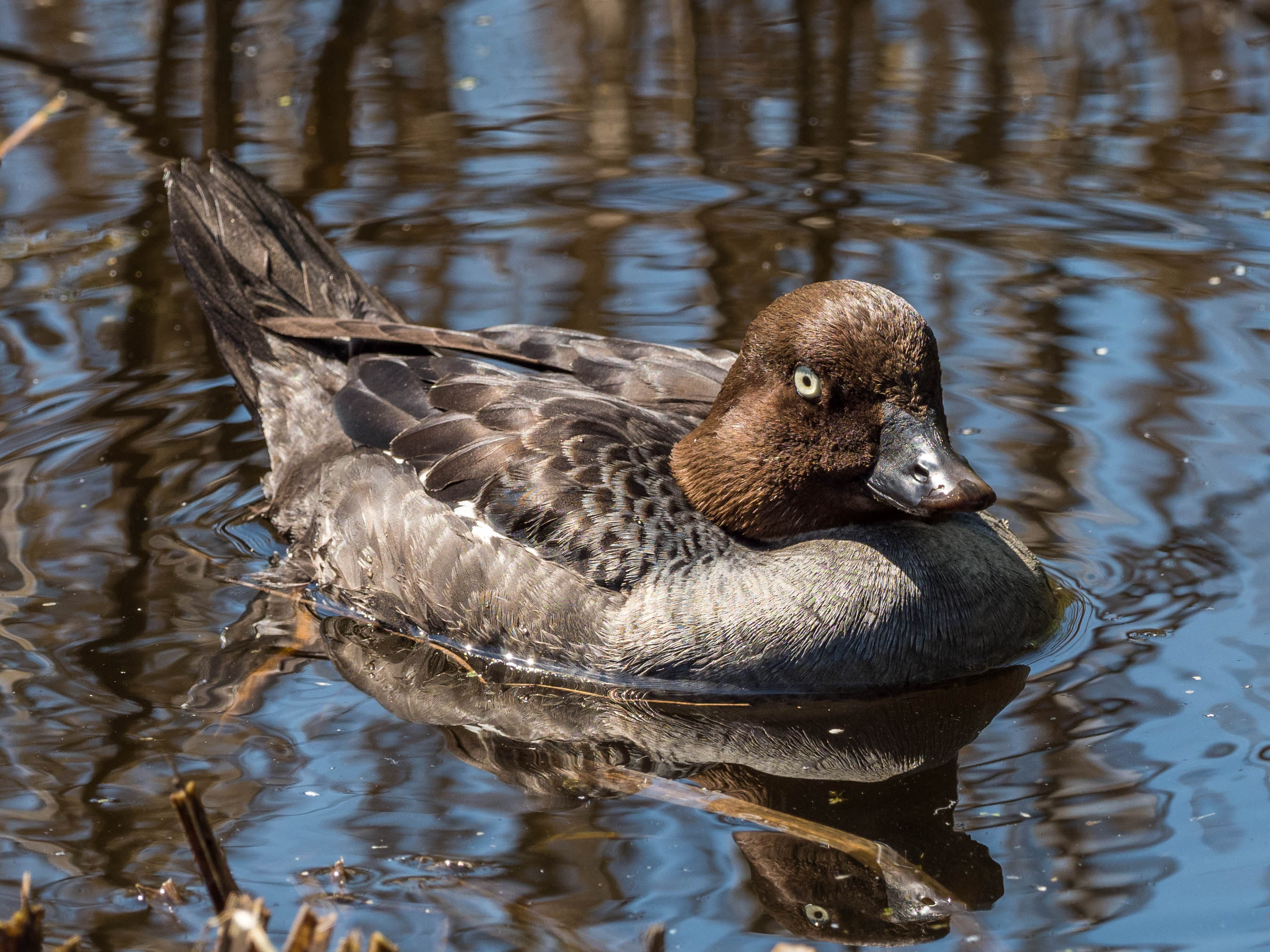 Busephala clangula